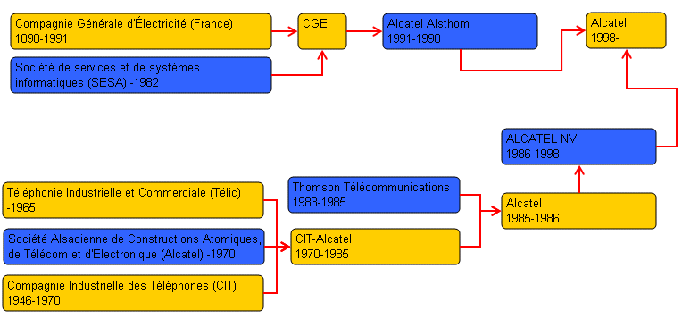 Source: Lax1 License: Public Domain